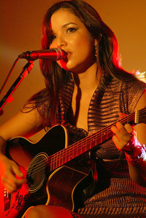 A cantora Liah no show de lançamento de seu novo CD, "Livre".